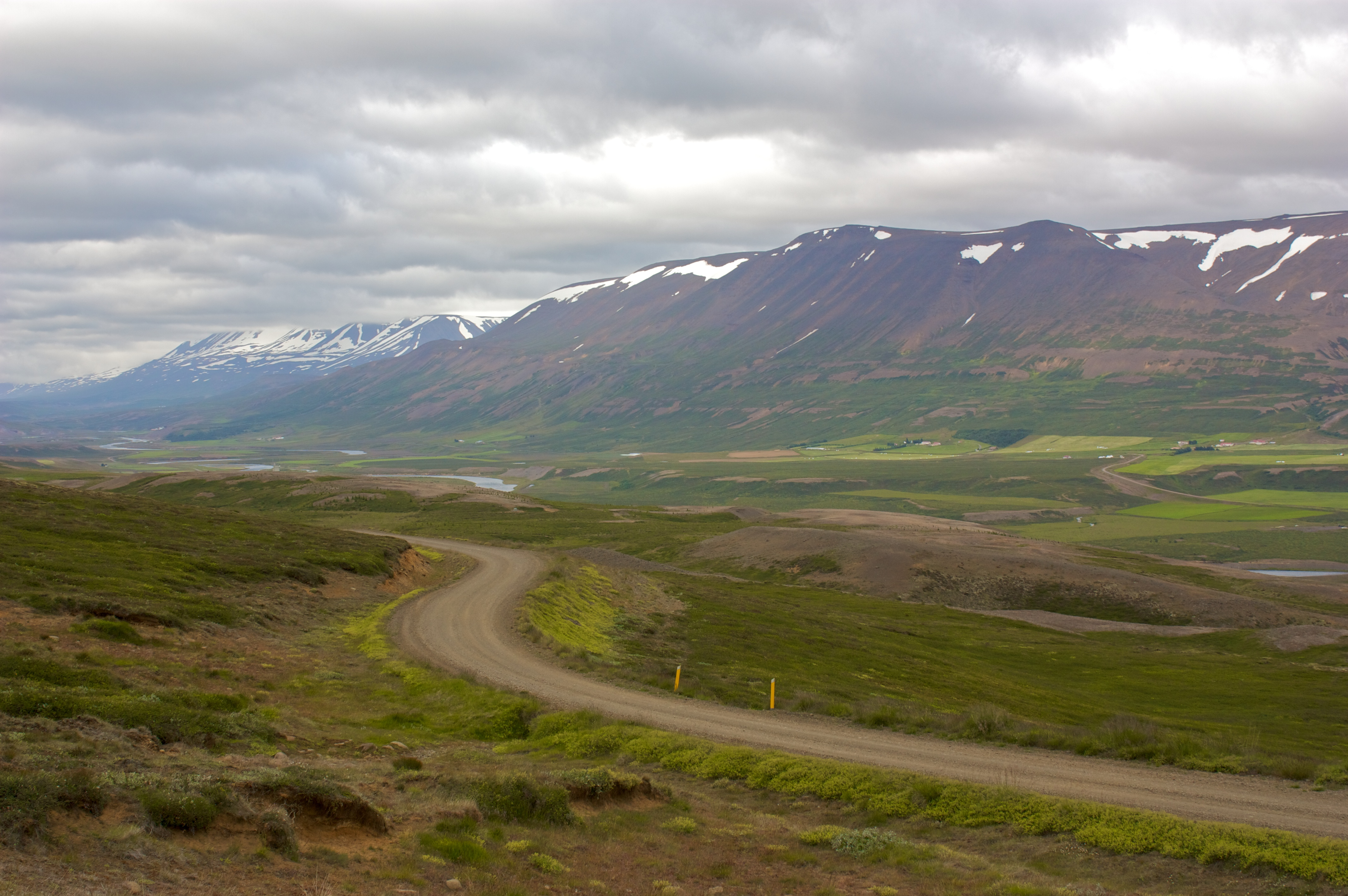 Fnjóskadalur